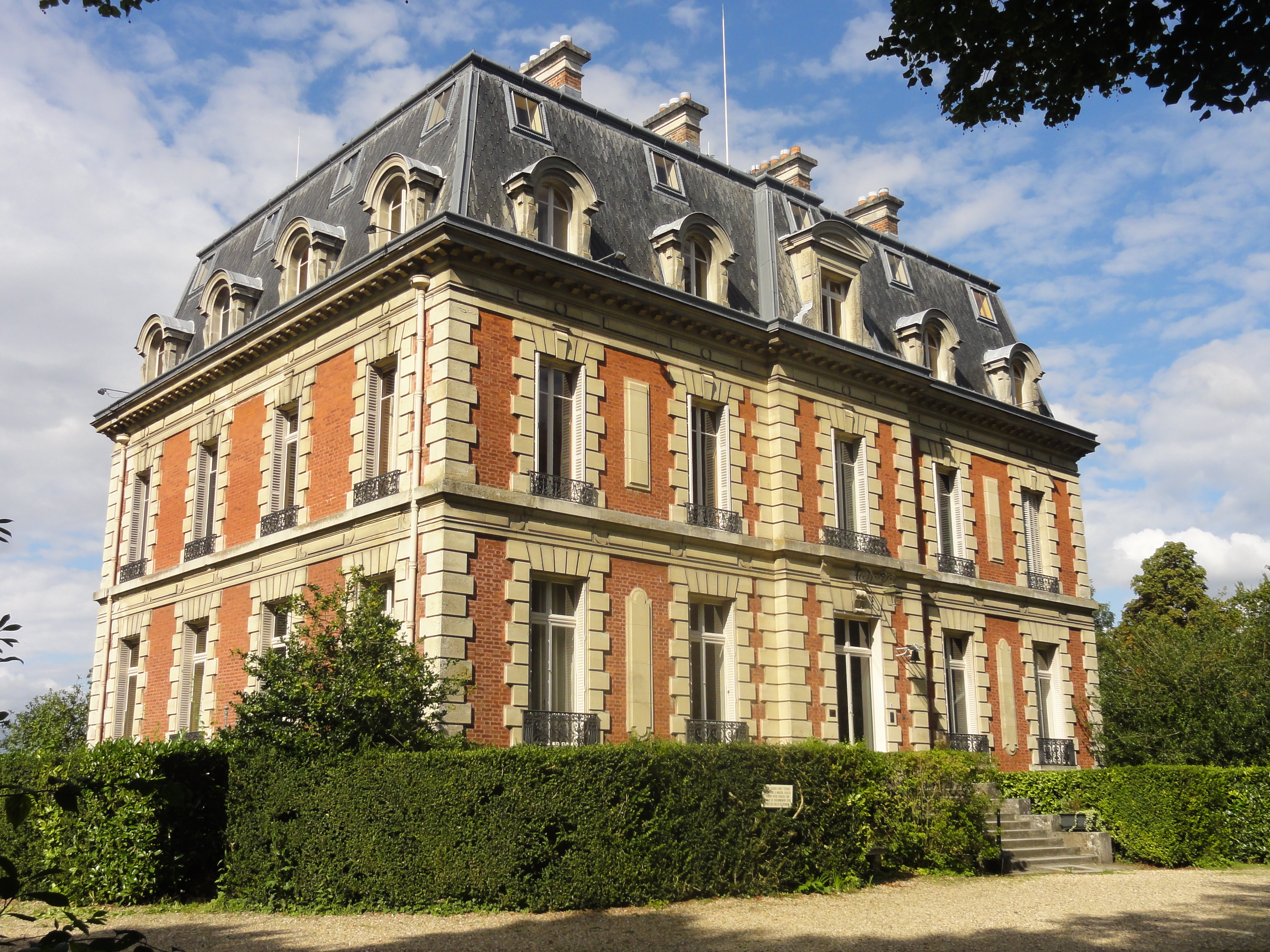 Château, vue depuis le sud-ouest.